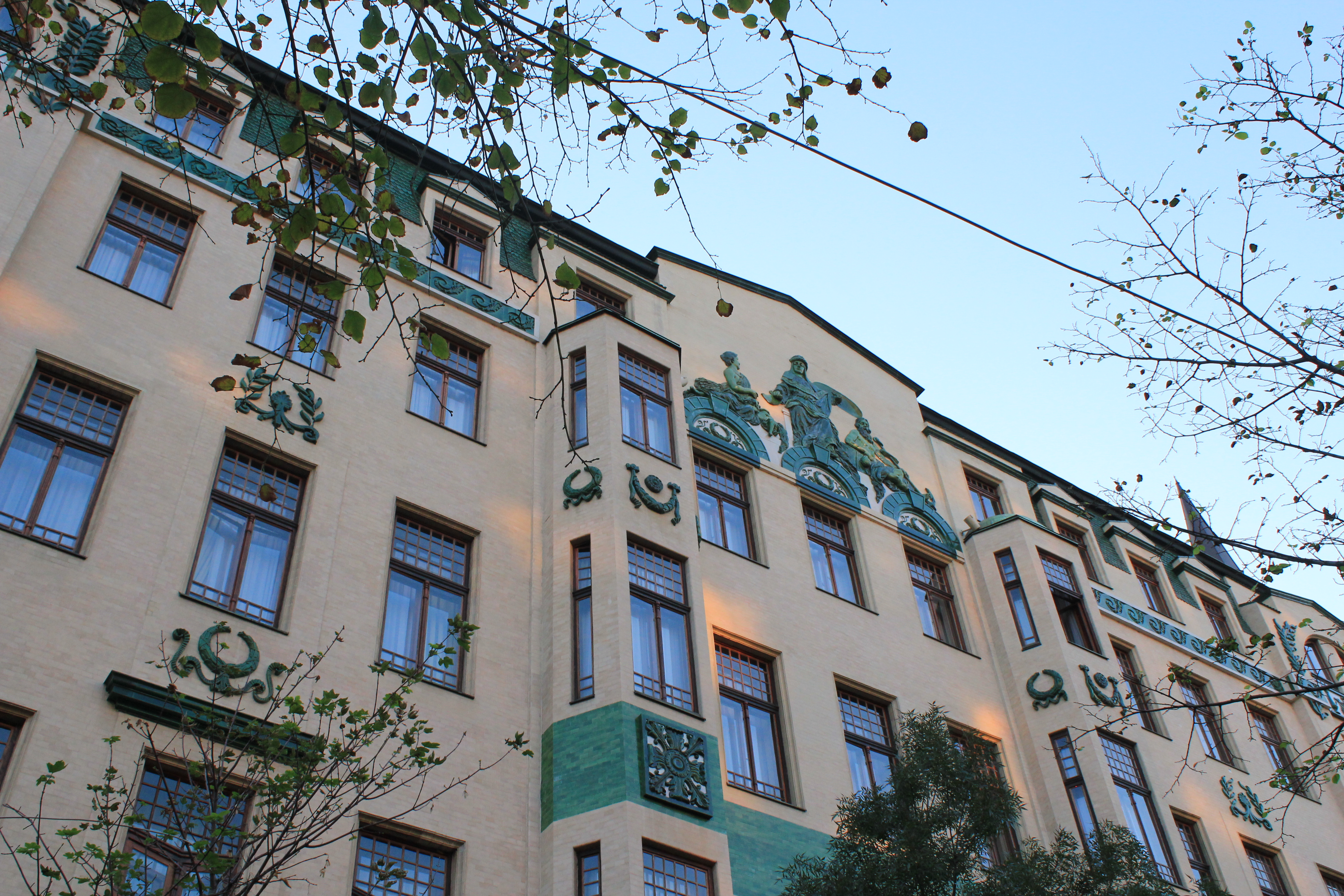 Zgrada hotela „Moskva“